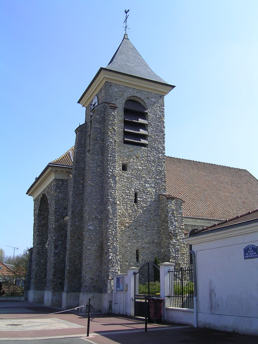 Eglise Saint-Nicolas, rue de l'Eglise Photo personnelle (own work) de Marianna